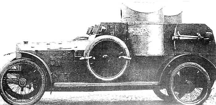 Британський кцулеметний бронеавтомобіь «Шеффілд-Симплекс» перед відправкою в Росію. Вид с правого борту.